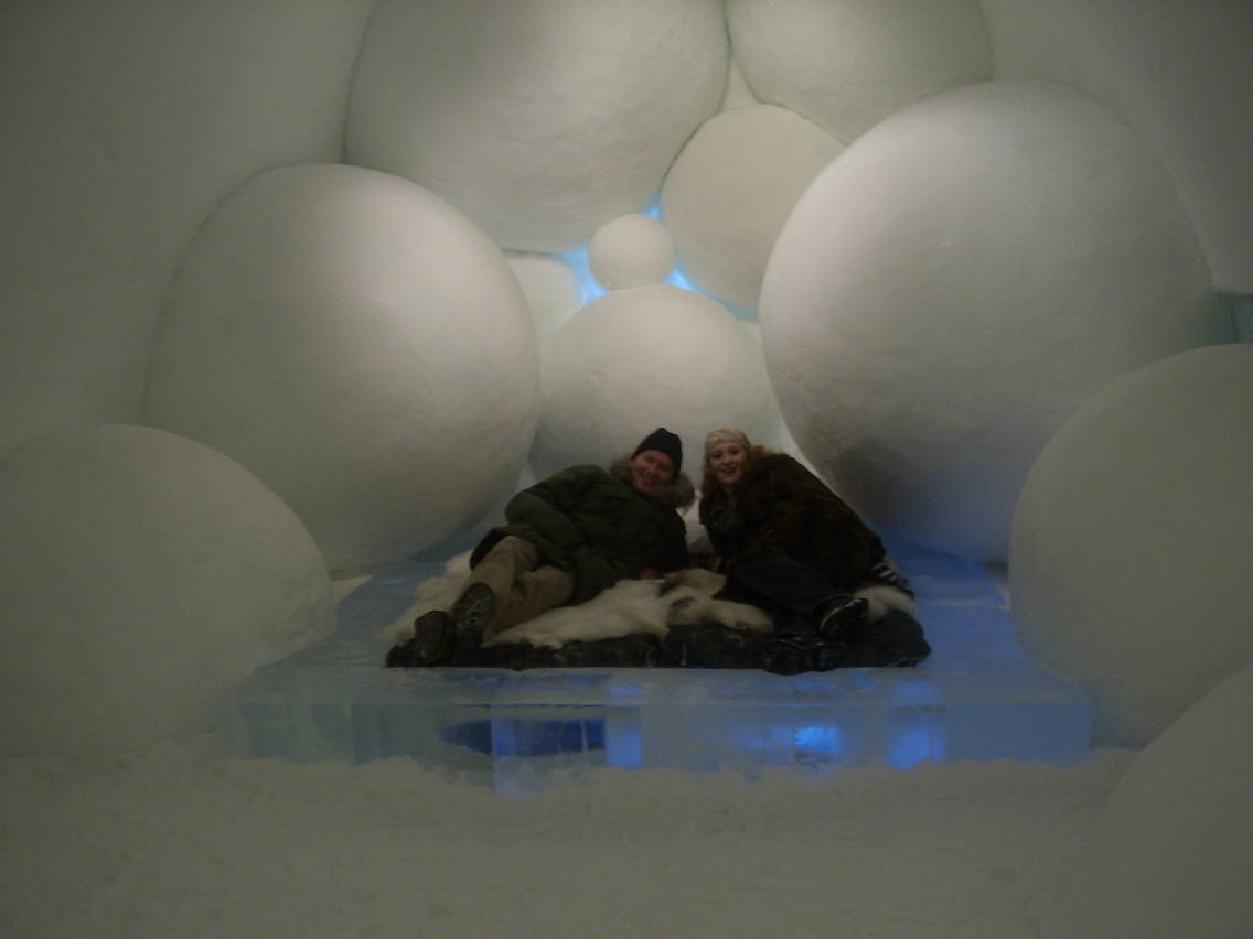 Interiér ledového hotelu.